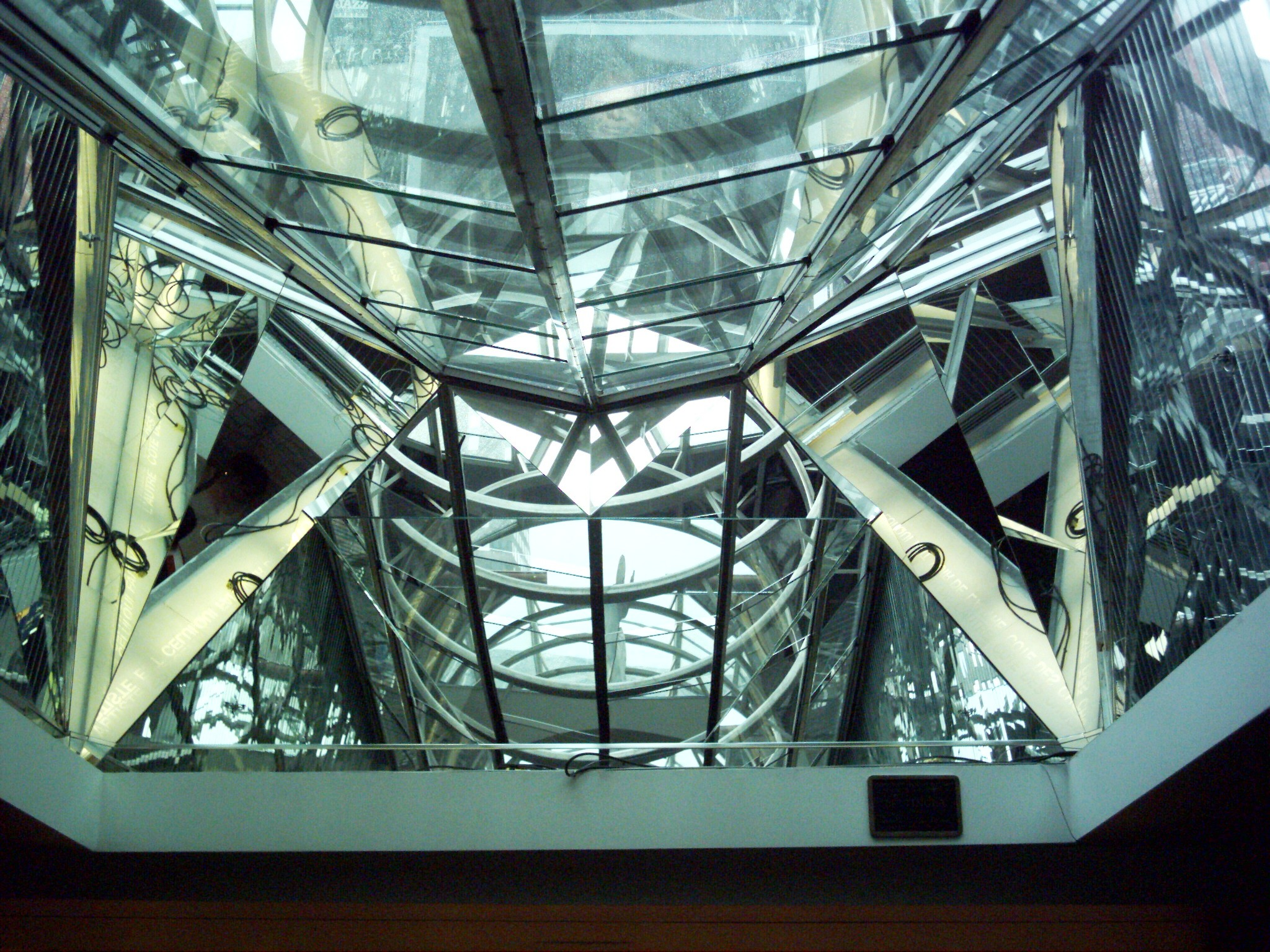 « L'artiste est celui qui fait voir l'autre côté des choses »; Claude Bettinger, 1992; Place-des-Arts, Montréal